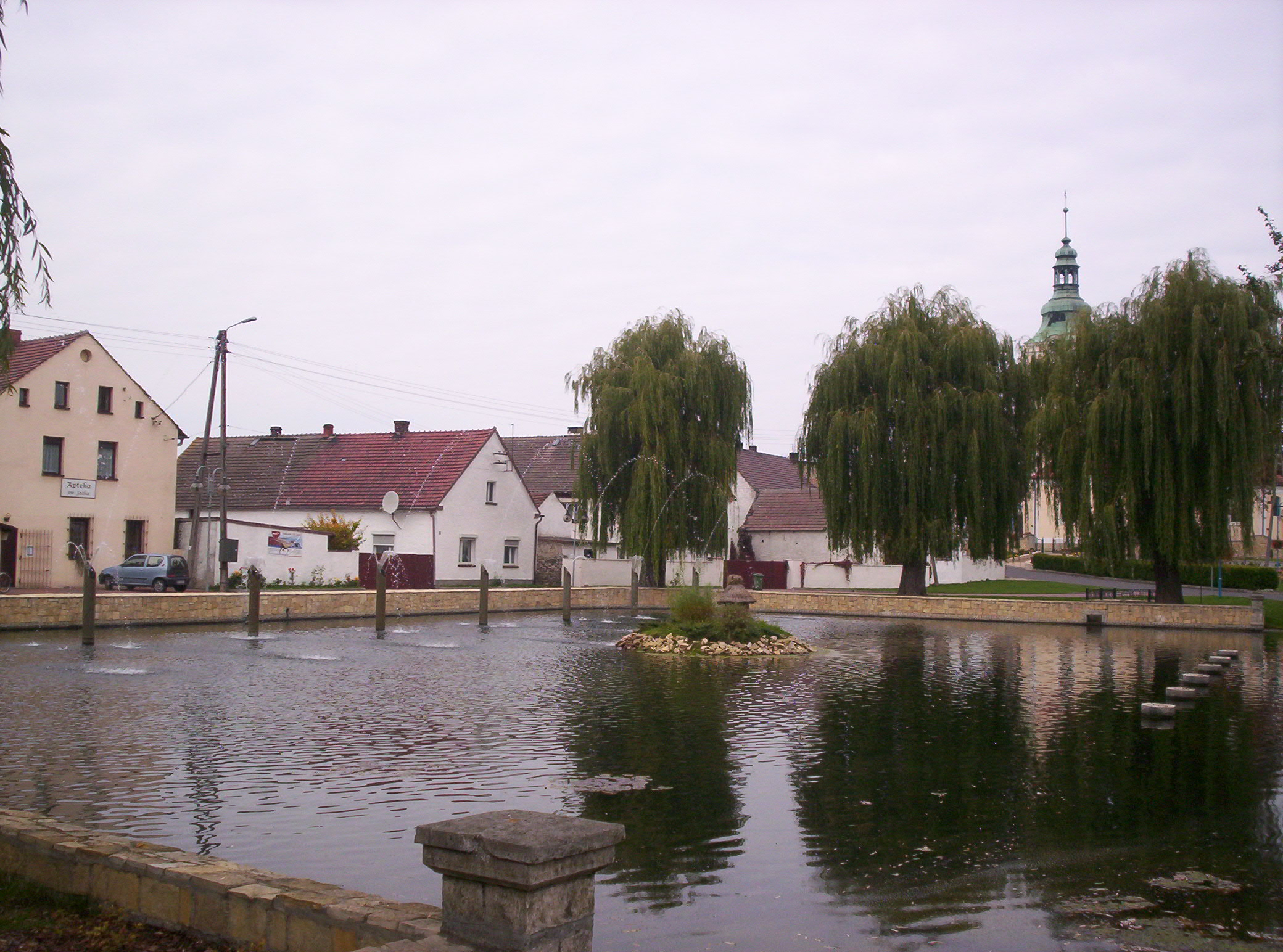 Teich in der Ortsmitte.